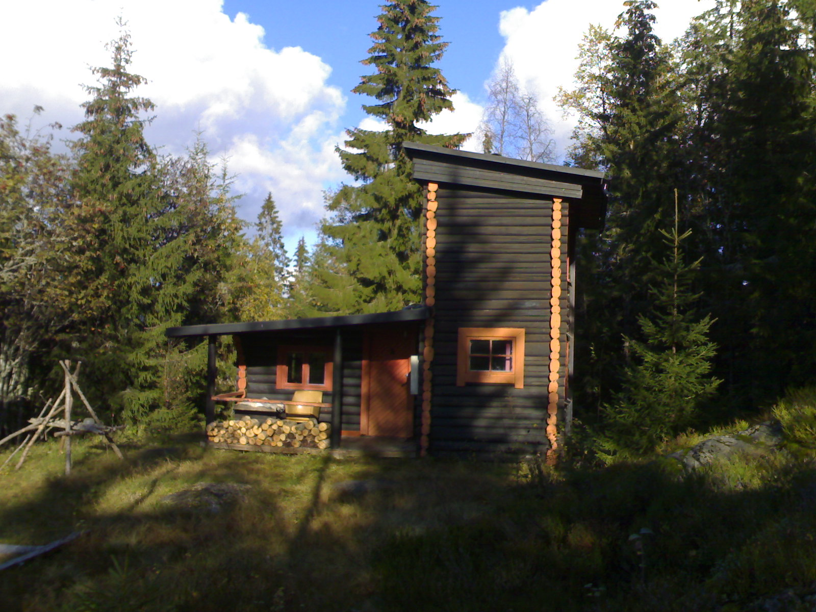 Speiderhytte på Bessliåsen nær Rognlivann